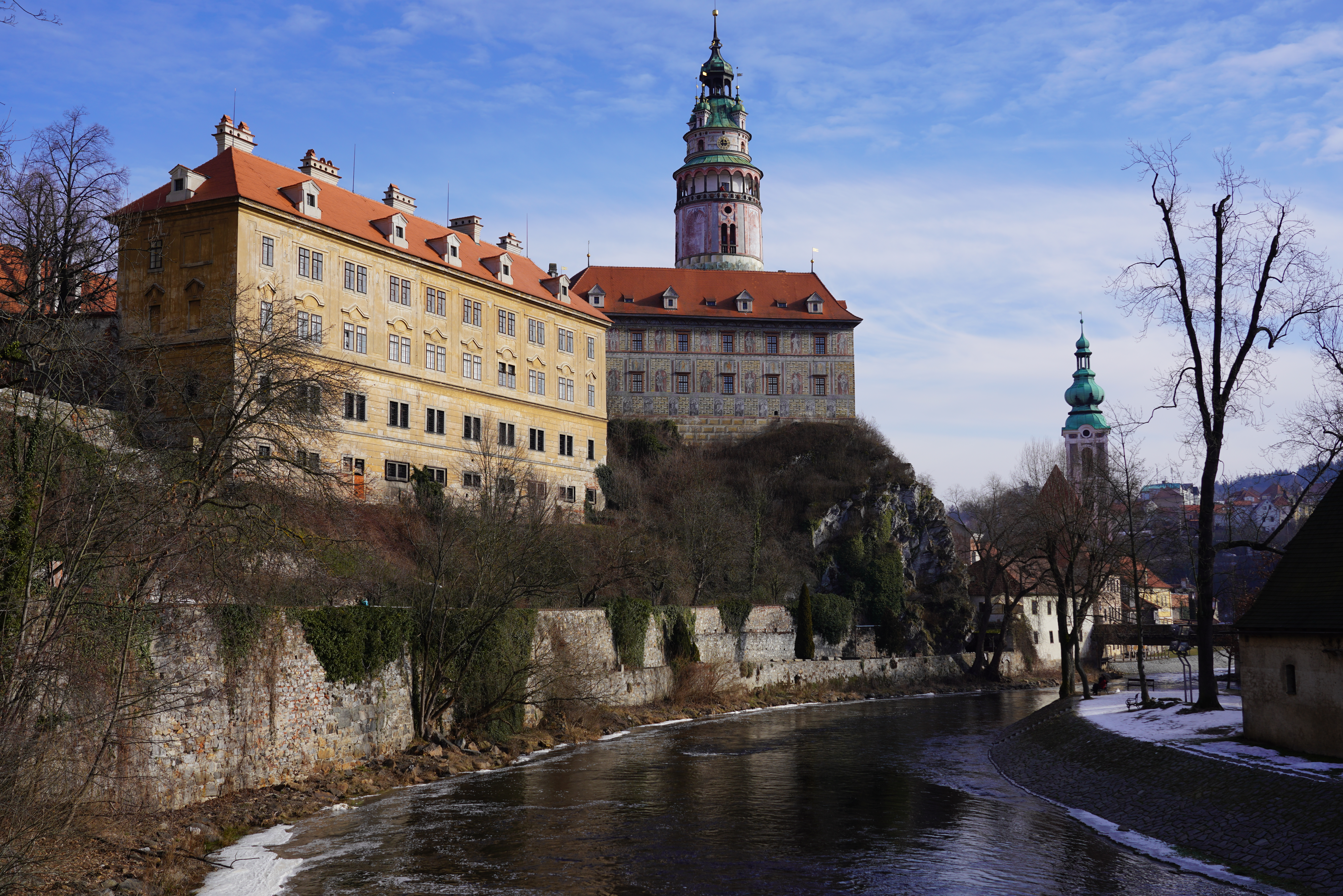 20190131_Krumlov_1701